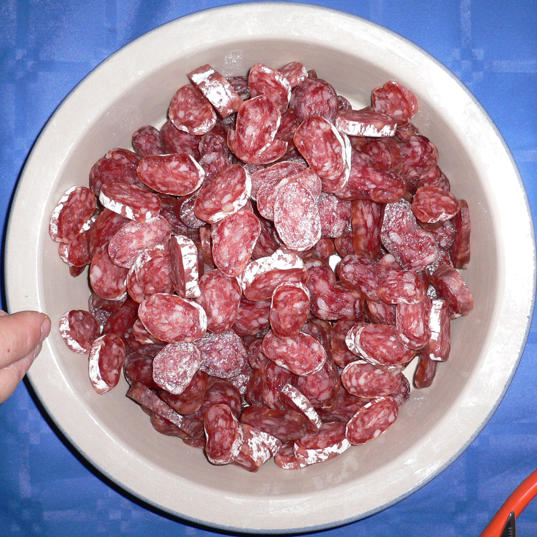 Spanish sausage-Fuet